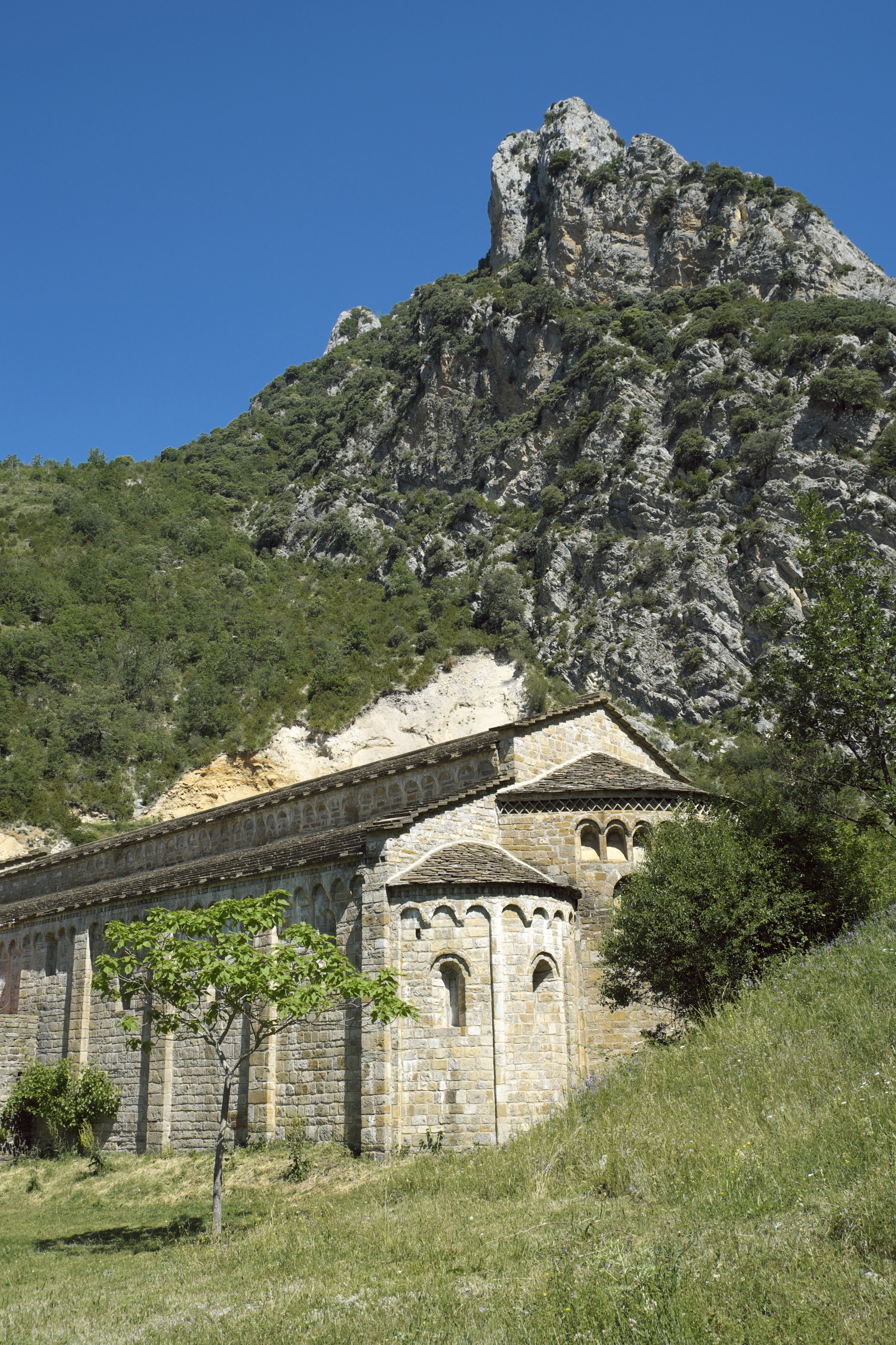 Ehemalige Benediktinerklosterkirche Santa María des Klosters Santa María de Obarra in Beranuy in der Provinz Huesca (Aragón/Spanien)